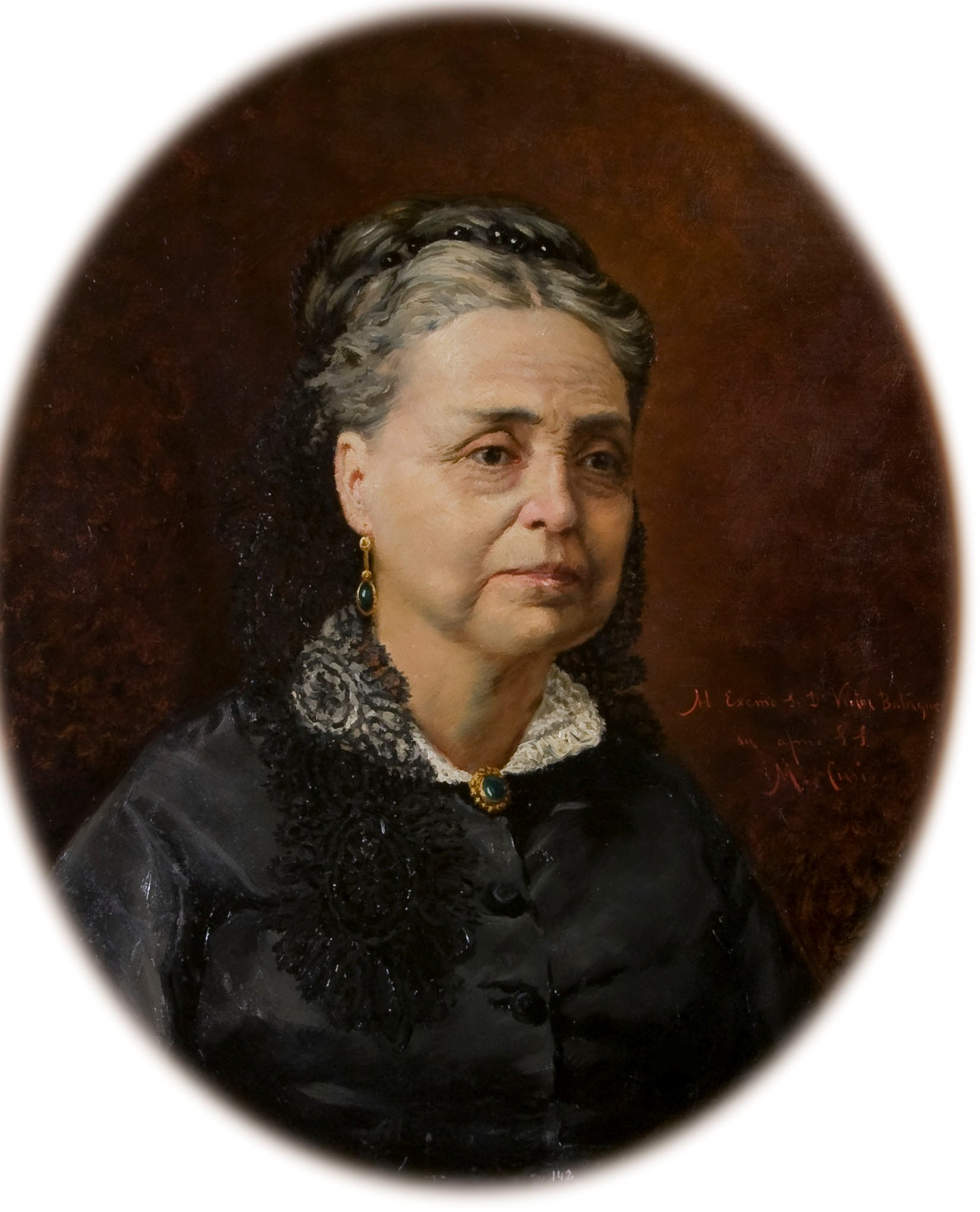 Retrat de bust de la poetessa Ma. Josepa Massanés en lleu escorç cap a la dreta de la composició. Të el cabell blanc. Duu vestit negre, brusa de coll blanc amb puntes i una mantellina al cap